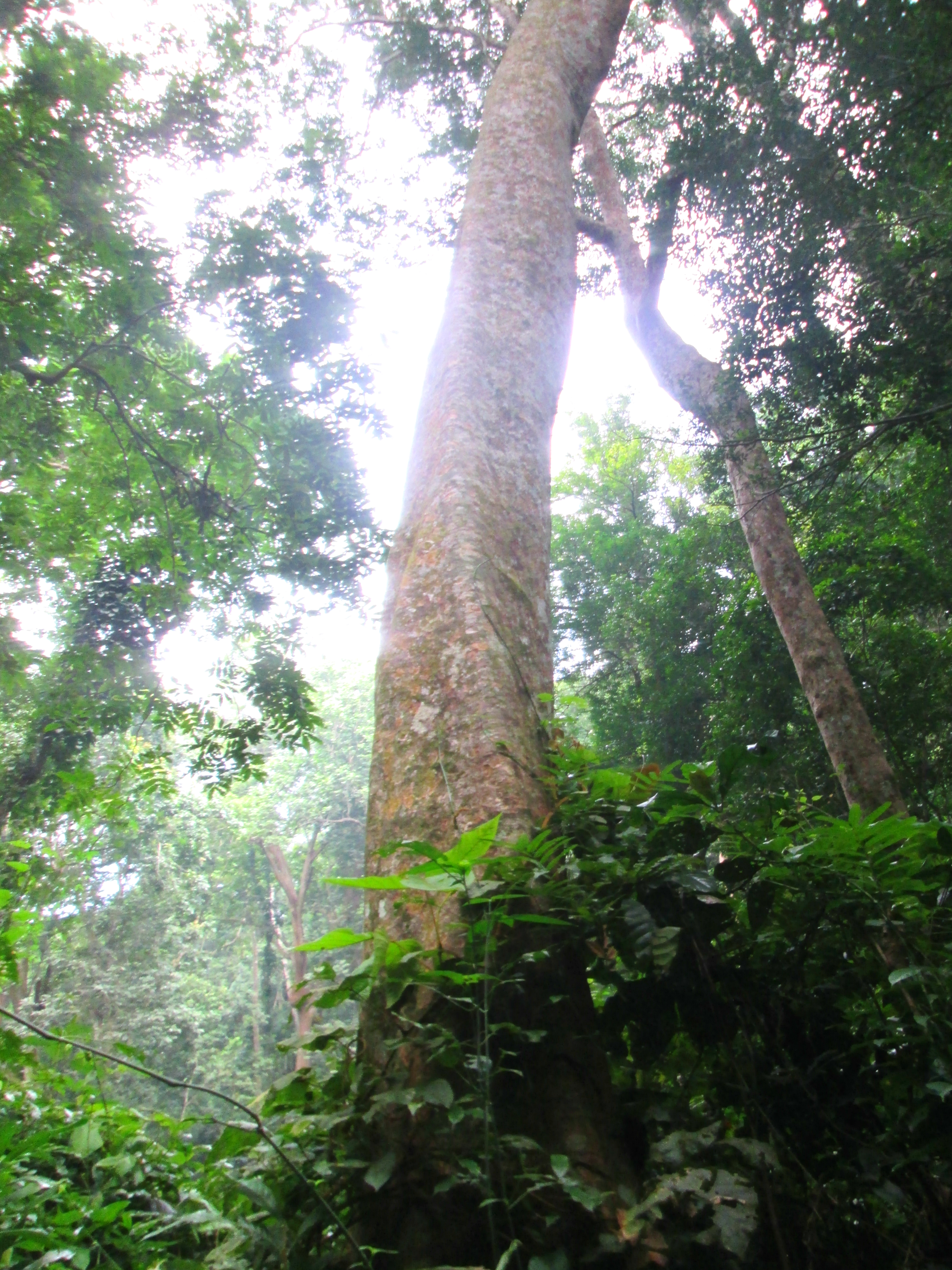 Cây cối ở đồi Cư H'Lăm1